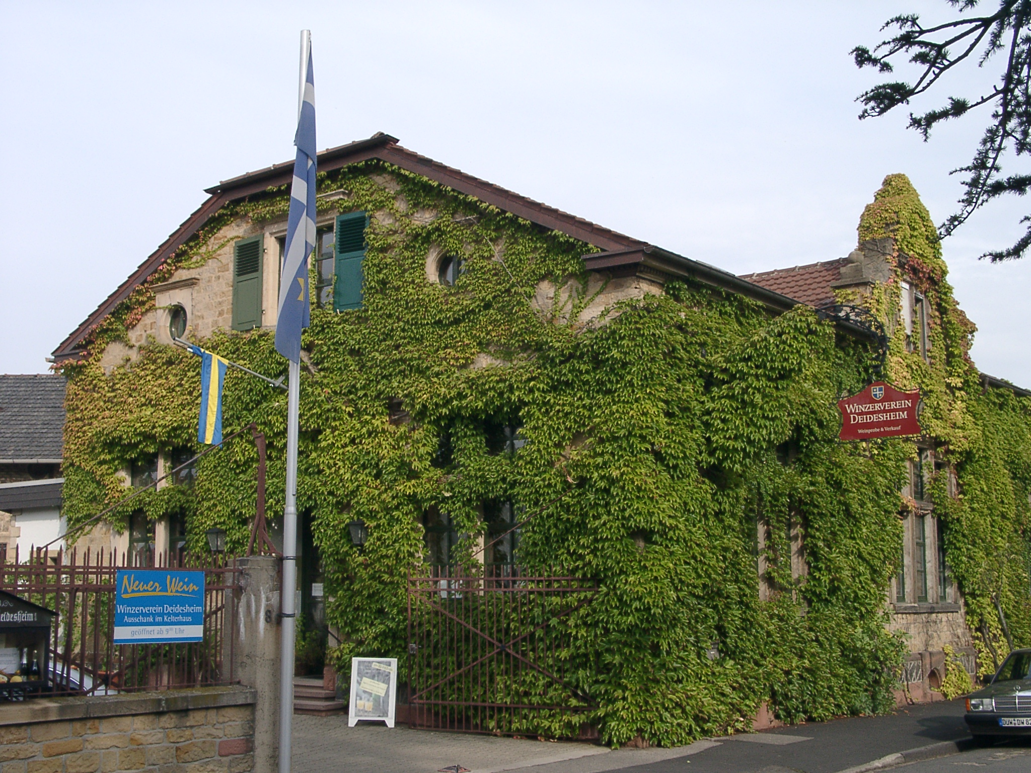 Zu sehen ist der Deidesheimer Winzerverein, der älteste seiner Art in der Pfalz. Er wurde 1898 gegründet.